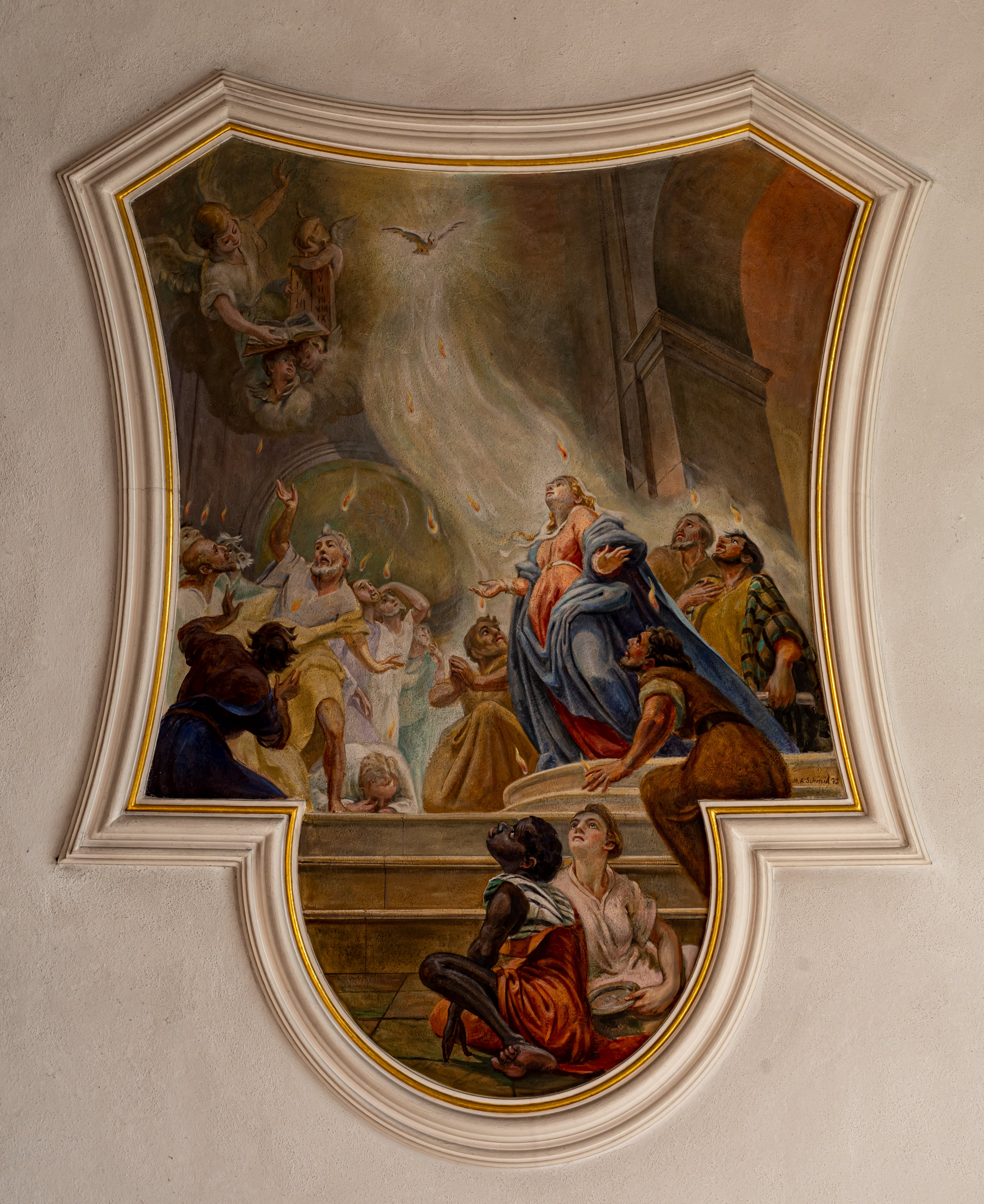 Bilder von St. Martin in Feldkirch